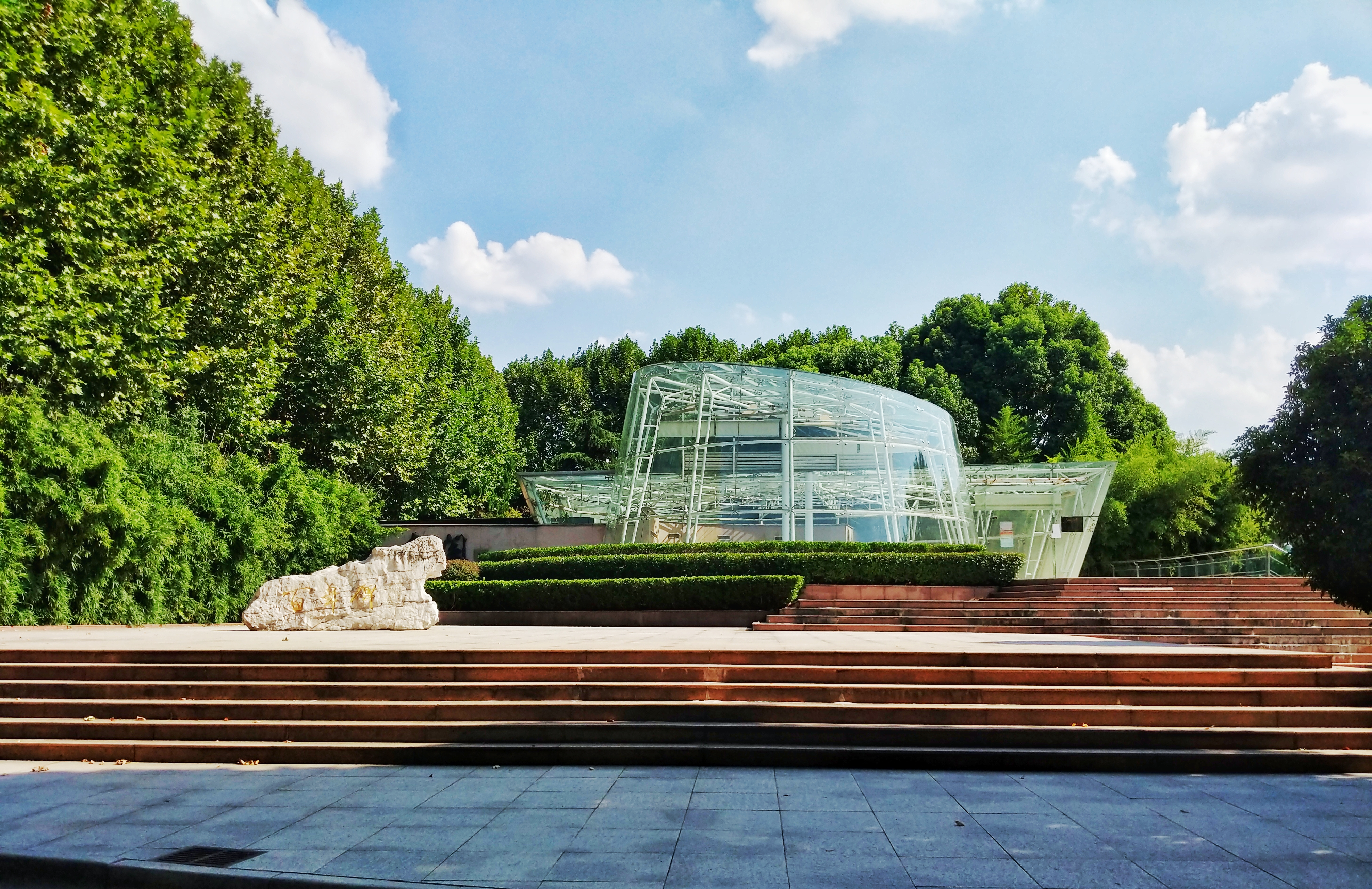 中文（中国大陆）: 南师附中桃李阁